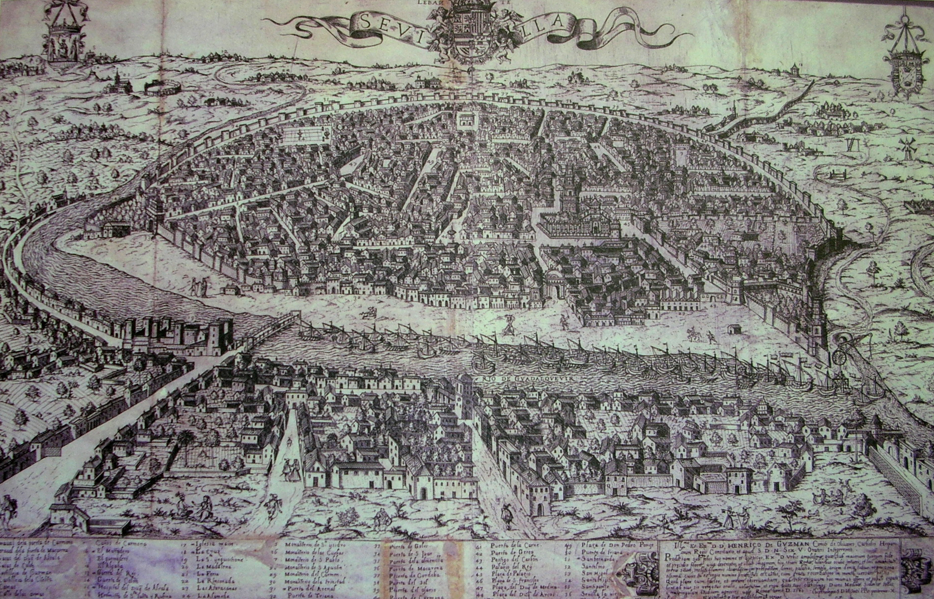 Vista de Sevilla a finales del siglo XVI